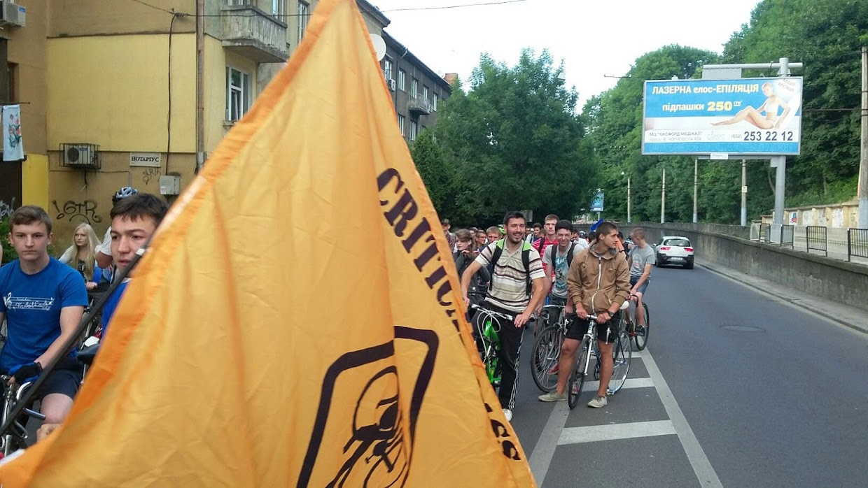 Колона